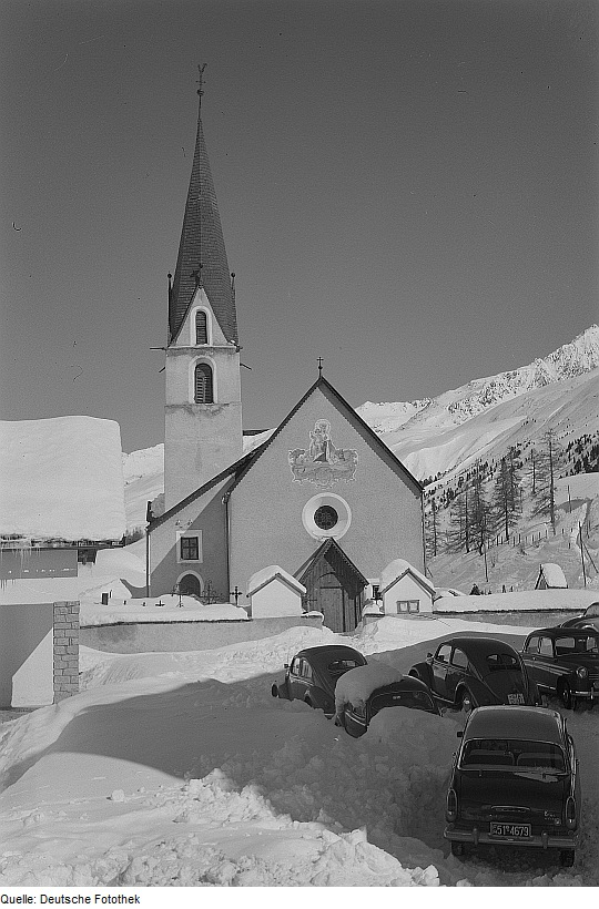 Original image description from the Deutsche Fotothek Obergurgl im Tirol. Blick zur Kirche